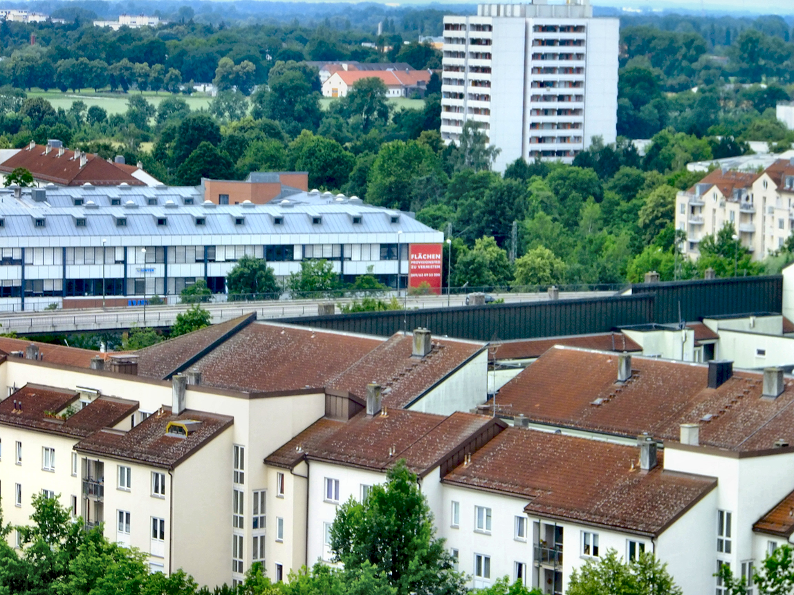 Le-Crès-Brücke in Unterschleißheim